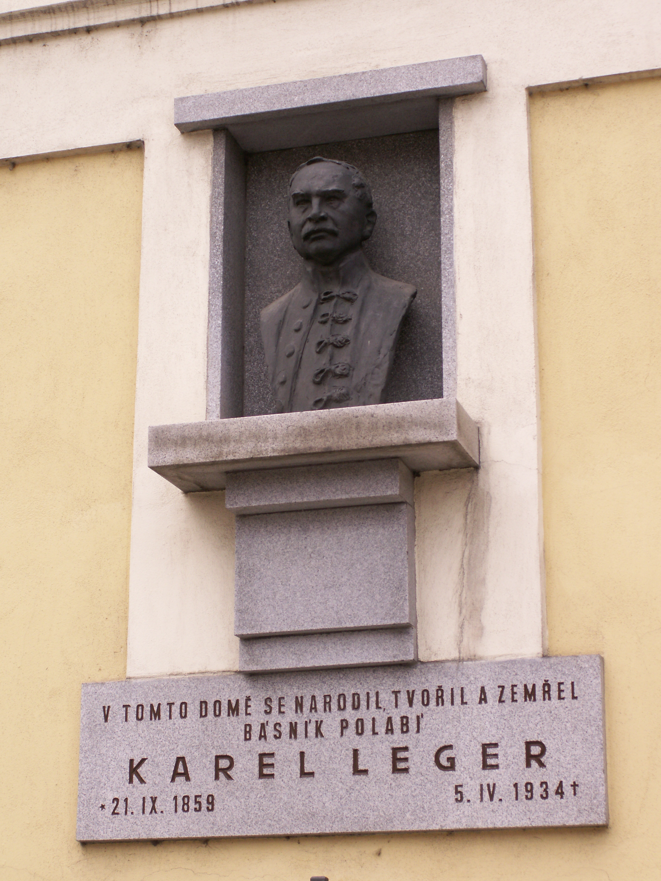 Kolín, Legerova ulice, pamětní deska Karla Legera (1859-1934)